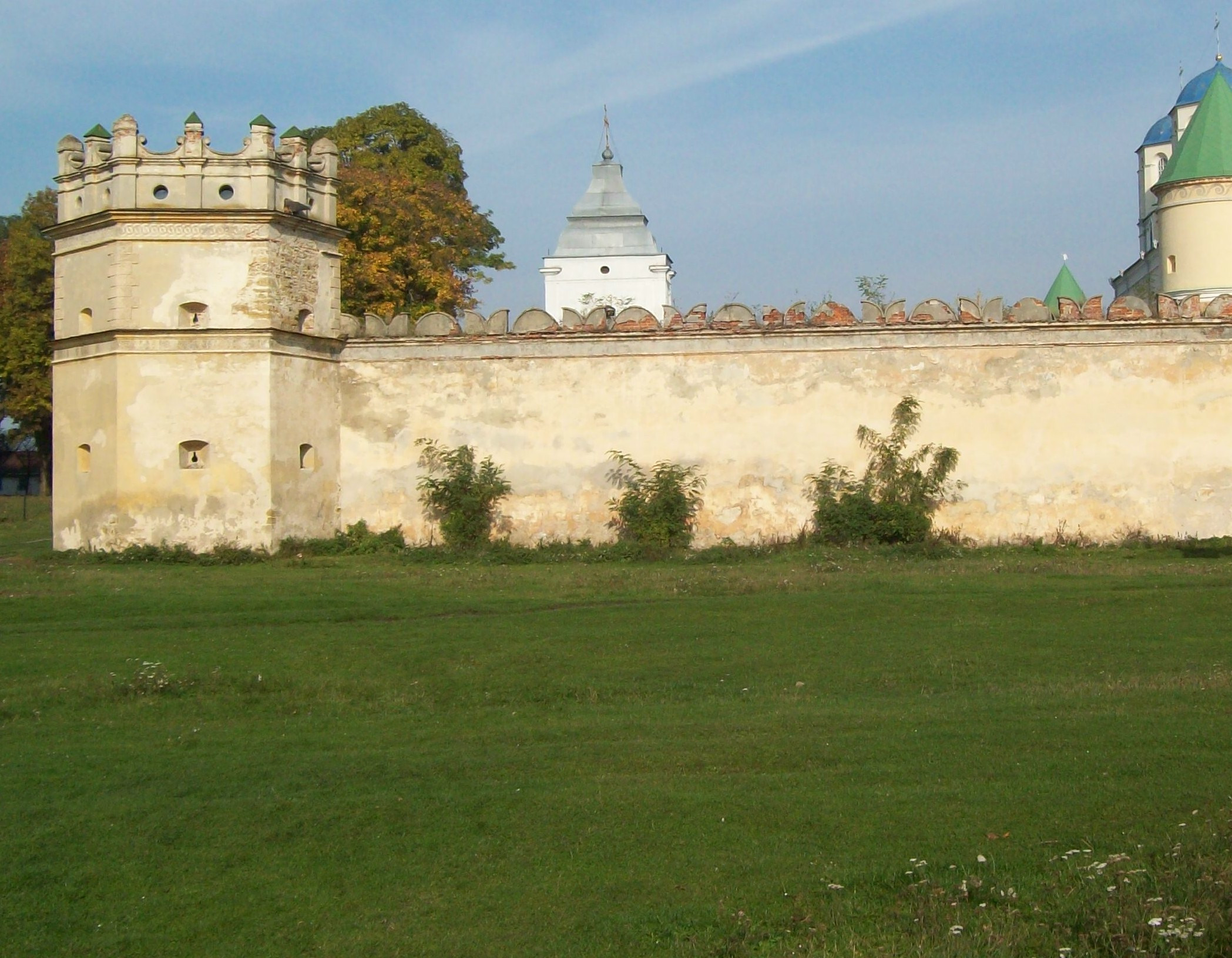 Знято фотоапаратом Kodak